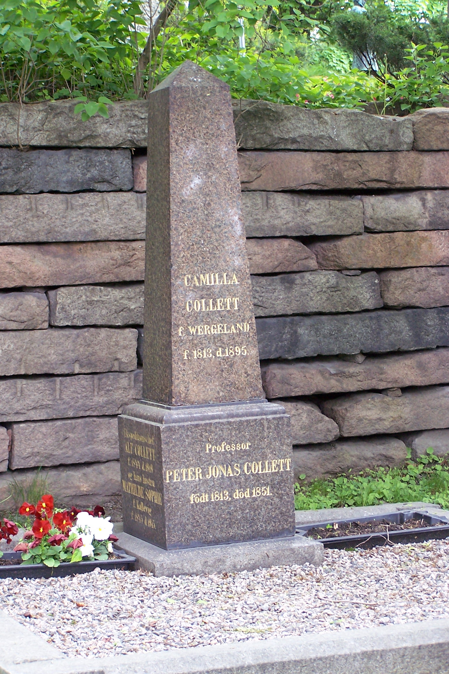 Tomb of Camilla Collett at Vår Frelsers gravlund, Oslo